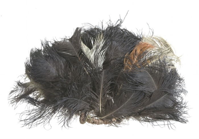 Struisvogelveren hoofdtooi van een chief van de Teso.